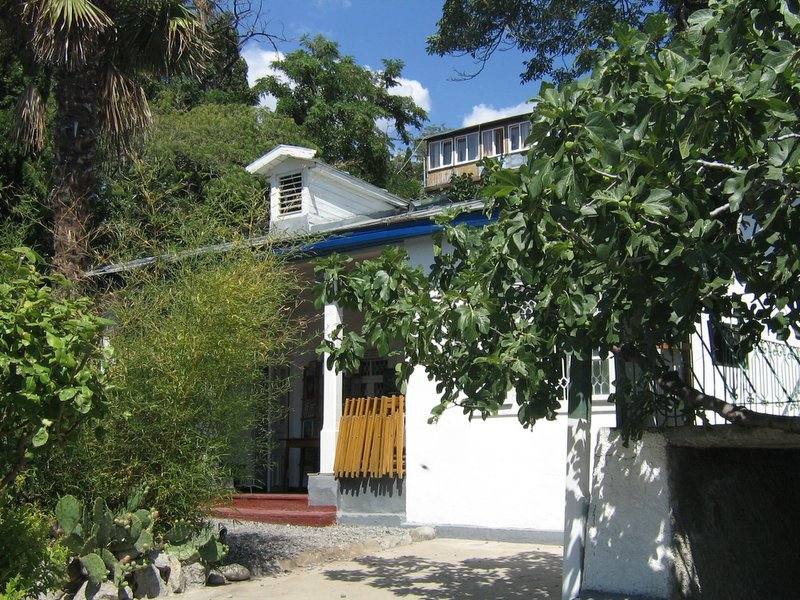 будинок дачі